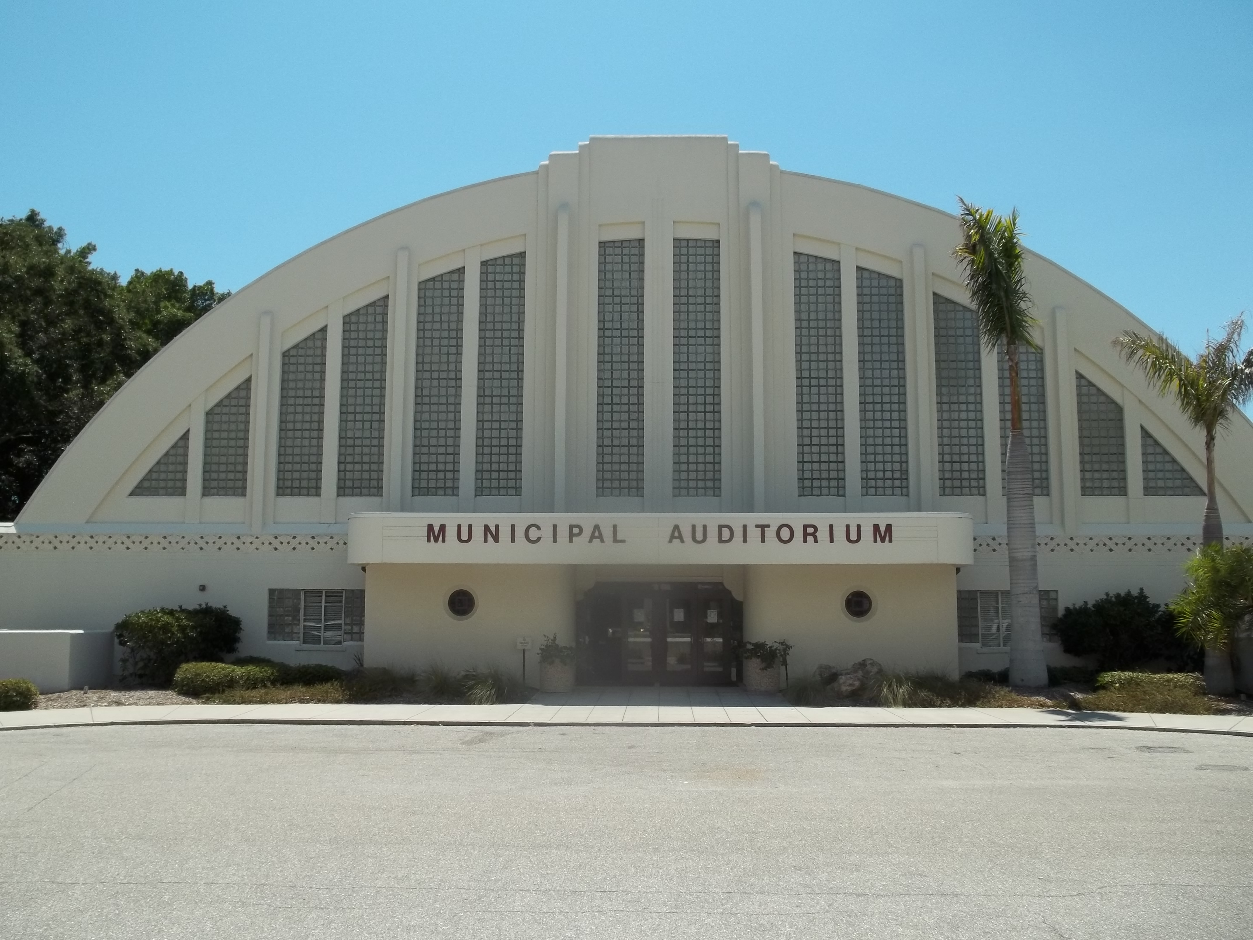 Sarasota, Florida: Municipal Auditorium-Recreation Club